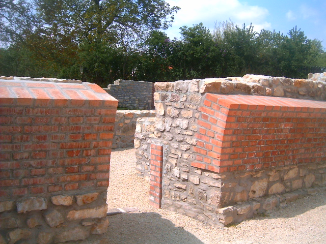 A veszprémvölgyi kolostorrom boltíve oldalról (Veszprém)